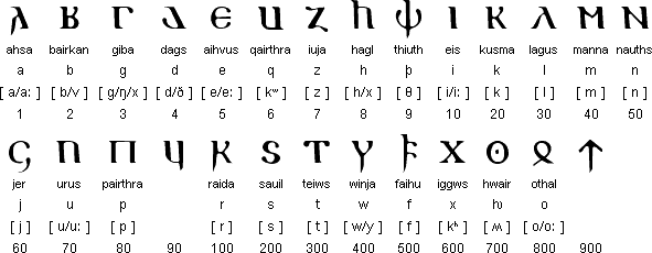 готский алфавит. сайт Омниглот